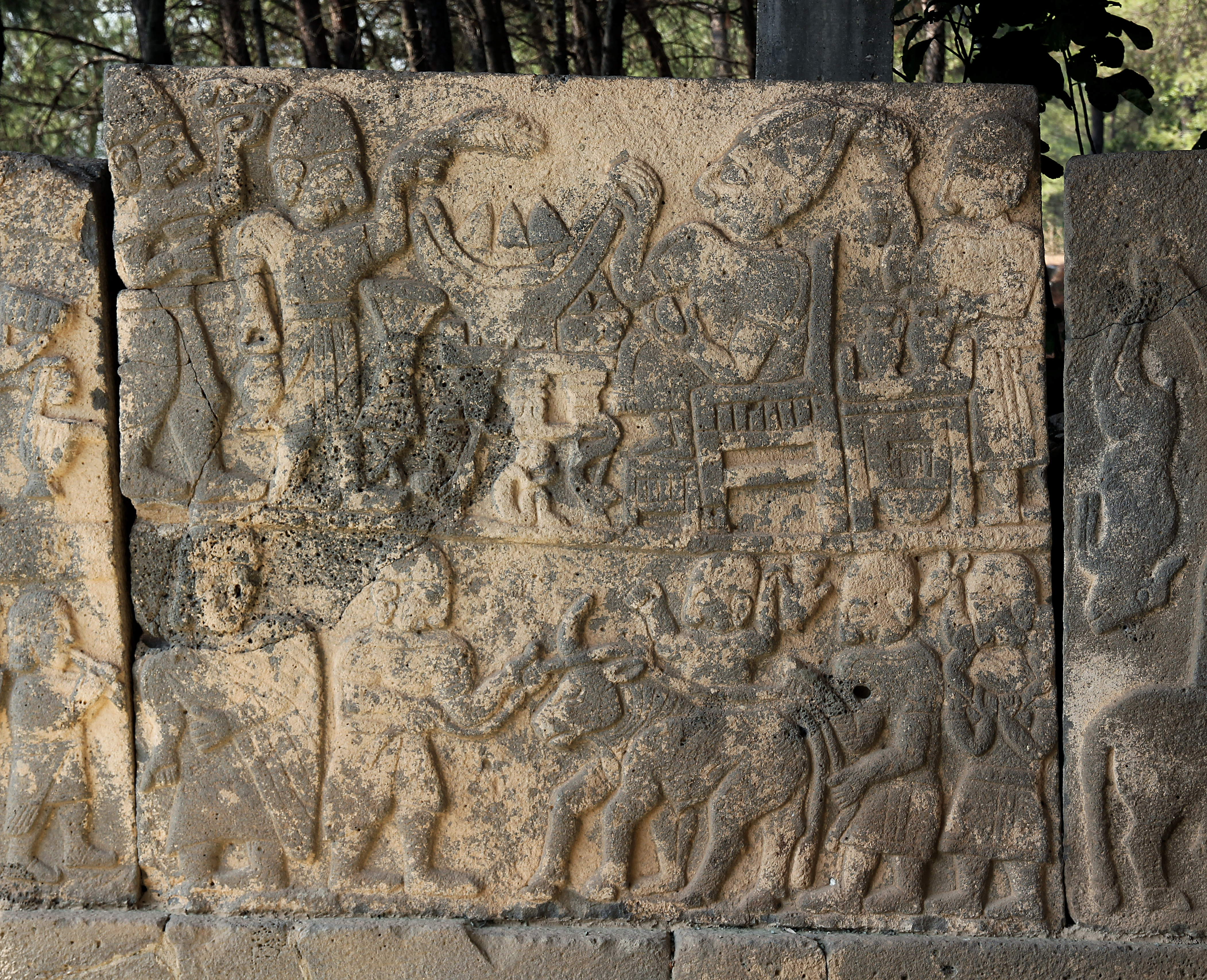 Karatepe (Asatiwataya), neo-hethitischer Fundort bei Osmaniye, Südtürkei, Relief am Südtor "Gastmahl des Asitawanda"